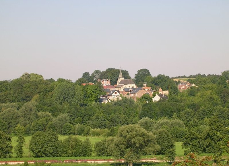 Panorama pris en été